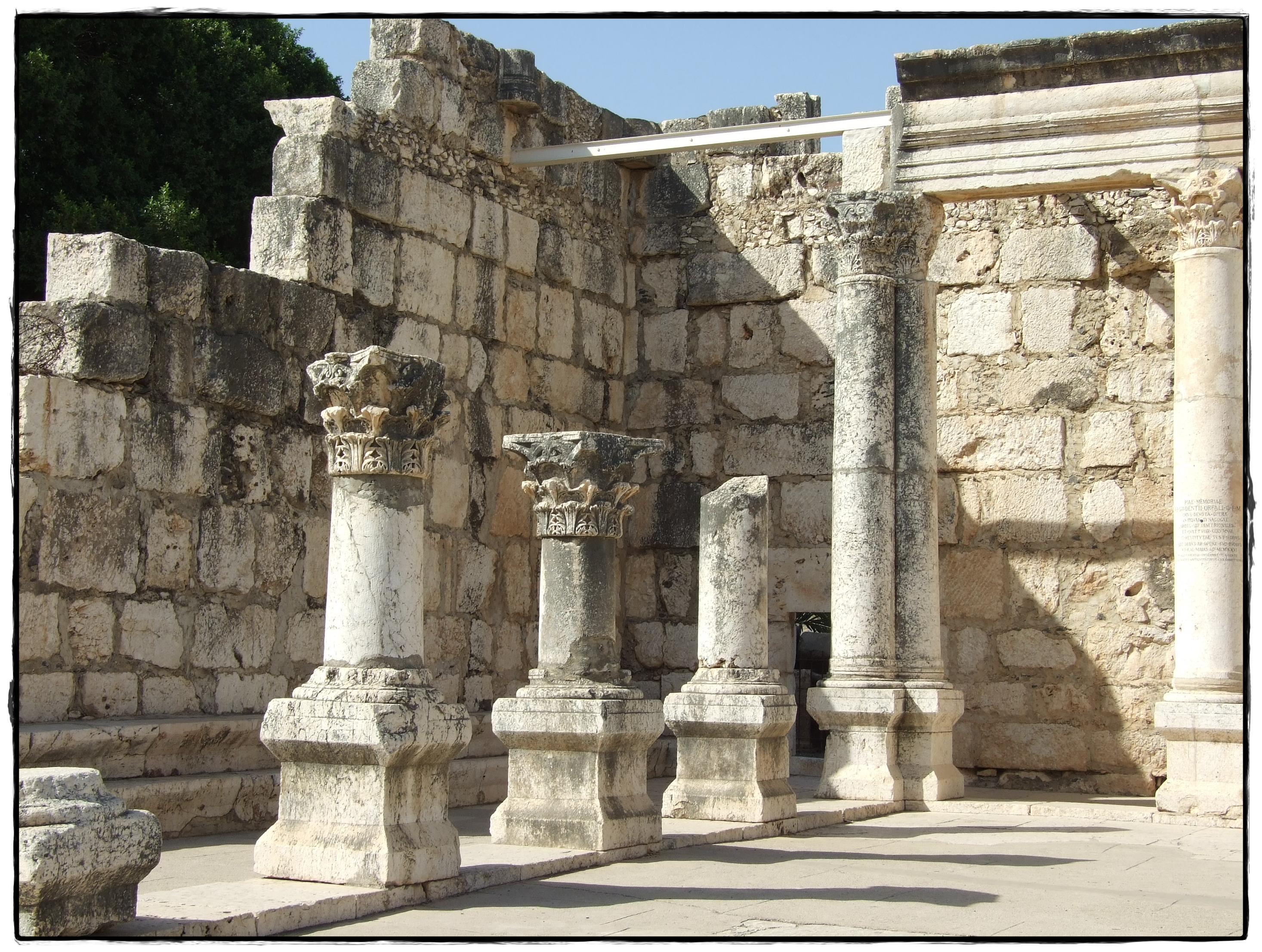 העיר העתיקה בירושלים (בערבית: بلدة القدس القديمة, נהגה: בִּלִדַת אֶלקוּדְס אֶלקָדִימָה) היא האזור העירוני העתיק של ירושלים. שטחה המוקף על ידי חומות ירושלים הוא כ-850 דונם.כמו כן נכללים בעיר העתיקה הר ציון ועיר דוד, הנמצאים מחוץ לחומות, בסמוך ומצד דרום. העיר העתיקה מהווה מוקד משיכה מרכזי לתיירים בני דתות ואומות שונות, אשר באים מרחבי העולם לבקר את האתרים הקדושים הנמצאים בה, ובהם: הר הבית, הכותל המערבי וכנסיית הקבר.